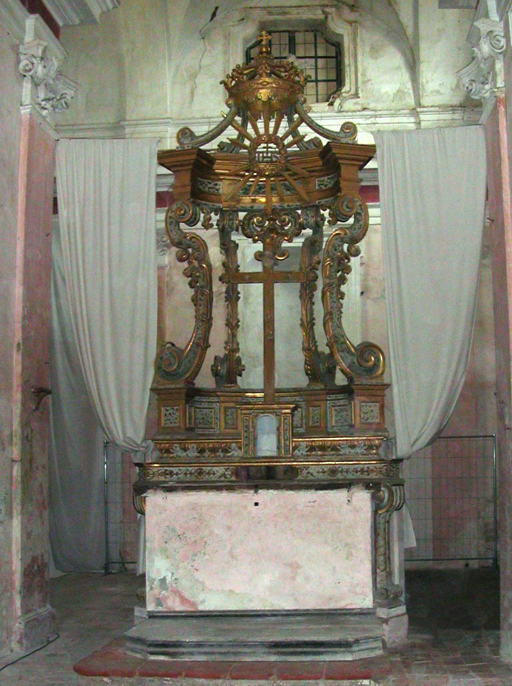 Pecetto (TO), chiesa dei Battuti (Batù, in piemontese), altare ligneo settecentesco prima dei restauri